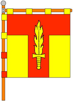 Прапор с. Тартаків